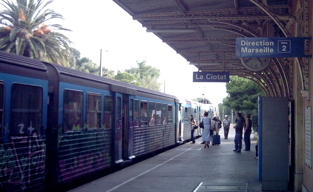 Une rame TER Toulon - Marseille en gare